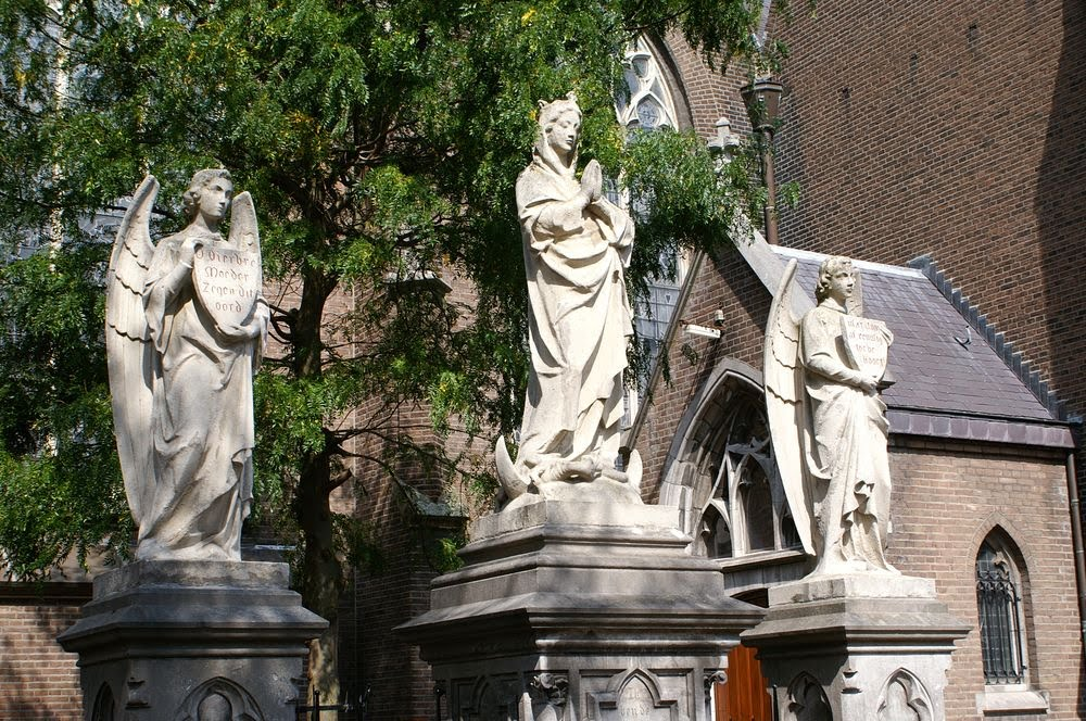 De beeldengroep naast de Grote Kerk te Oss.